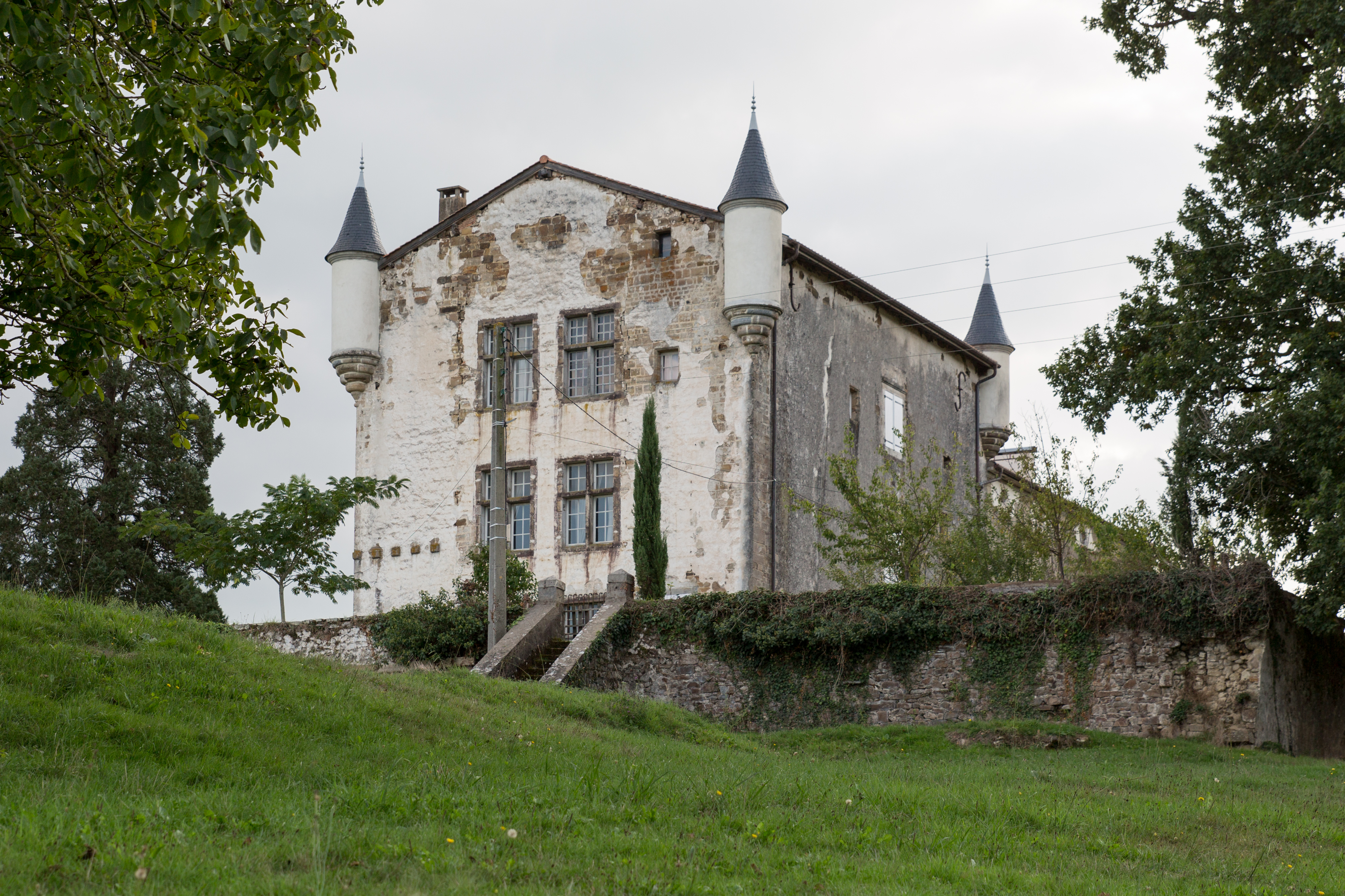 Château